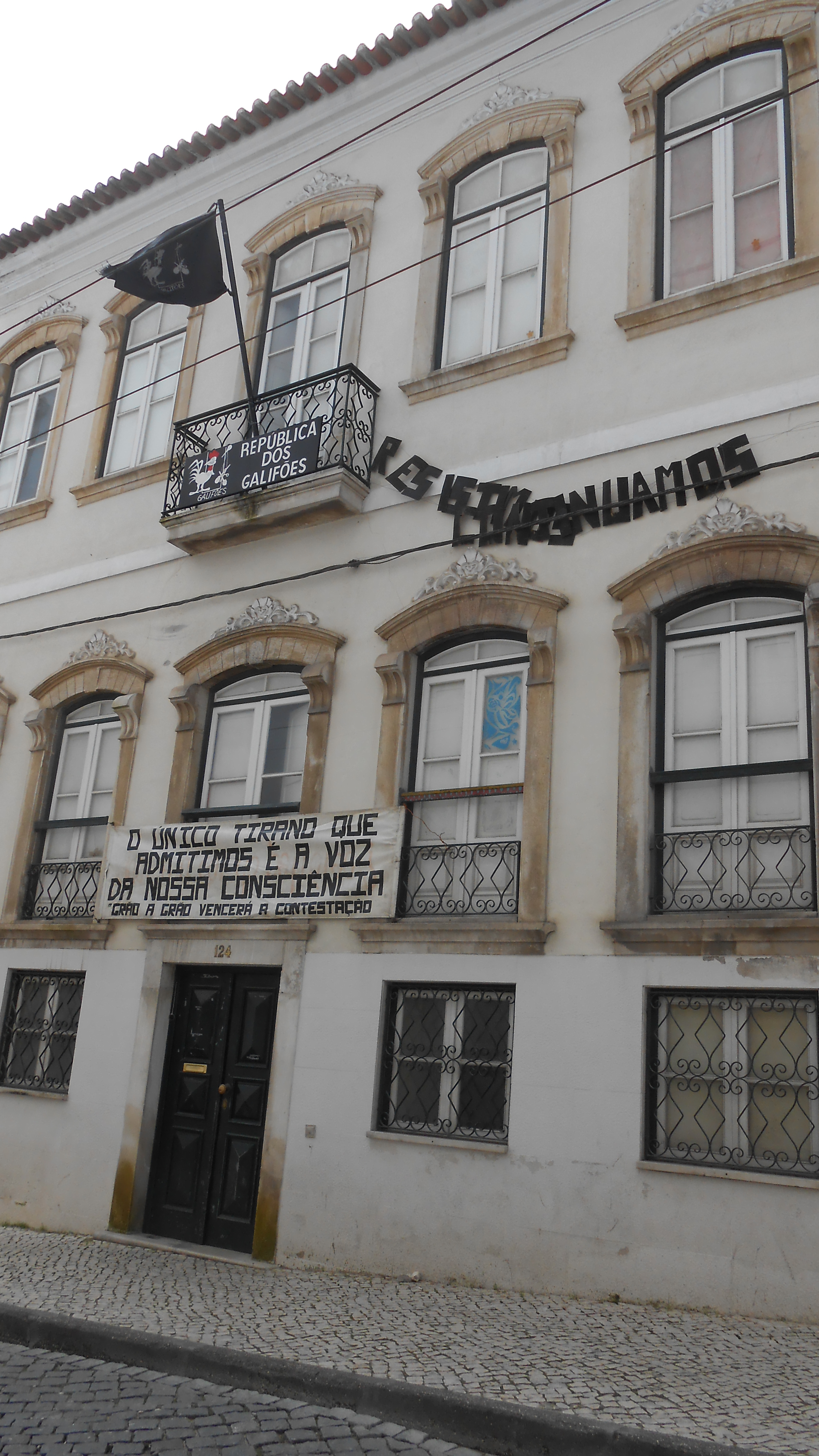 Die República do Galifões, eine der traditionellen Studentenwohngemeinschaften Coimbras